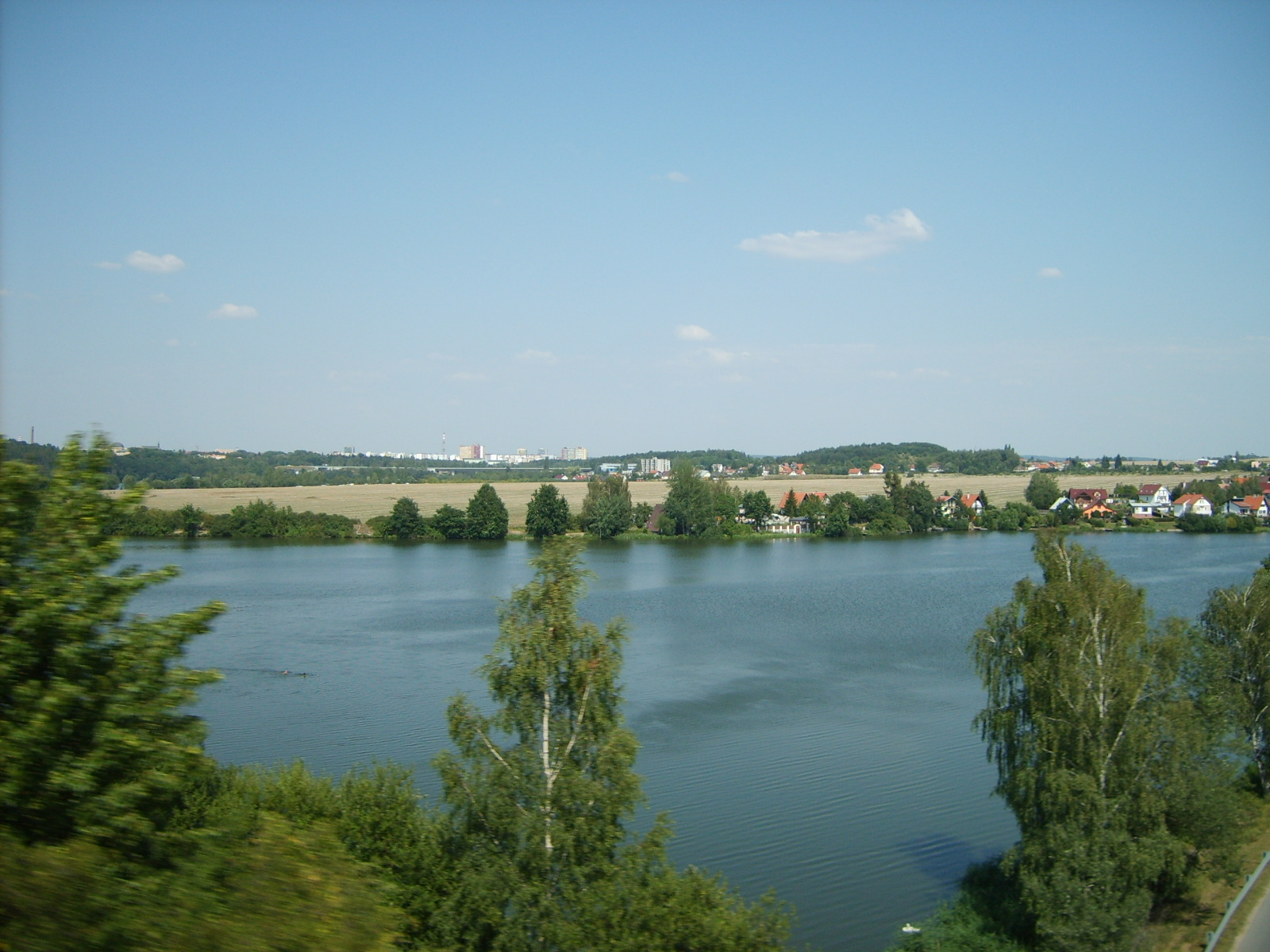 České údolí dam near Plzeň.